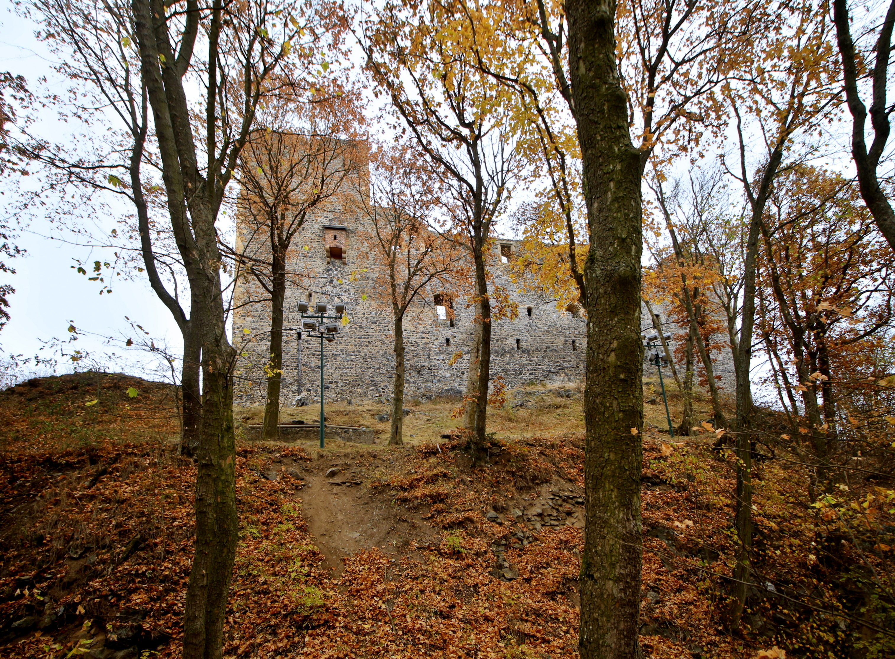 Hrad Radyně